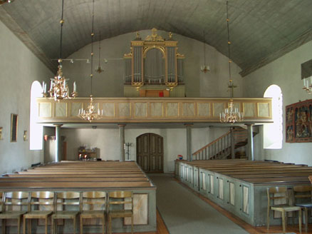 Sya kyrka.